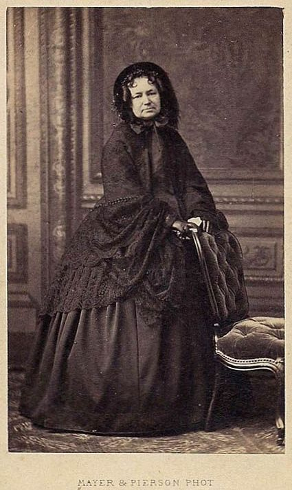 Anna z Sapiehów Czartoryska (1799-1864)